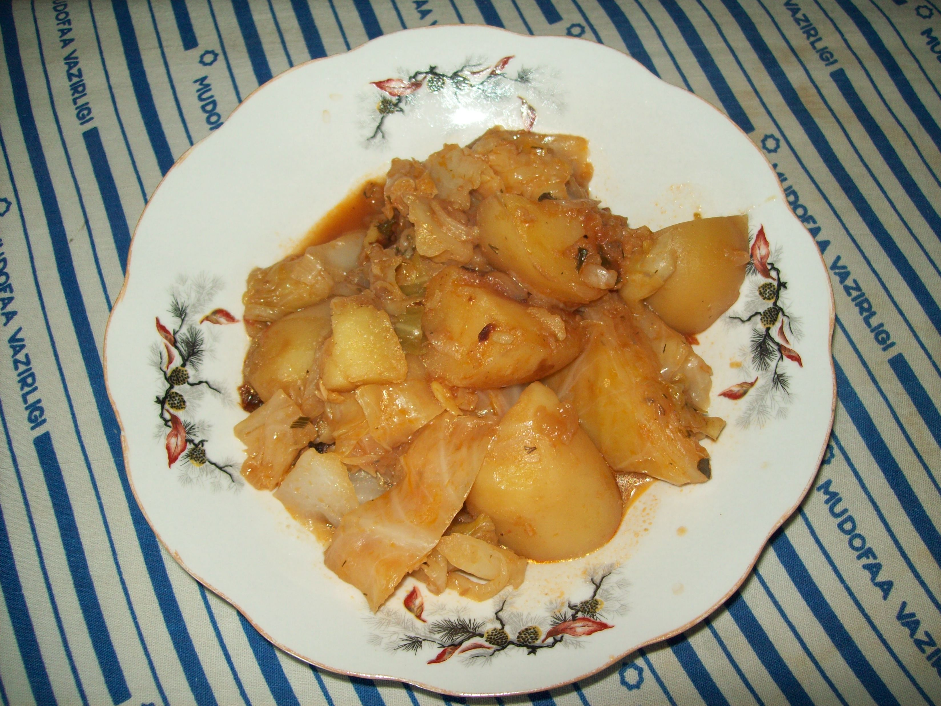 Приготовленны на пару овощи - капуста, лук, картофель. Название узбекской пищи - Карам дулма.